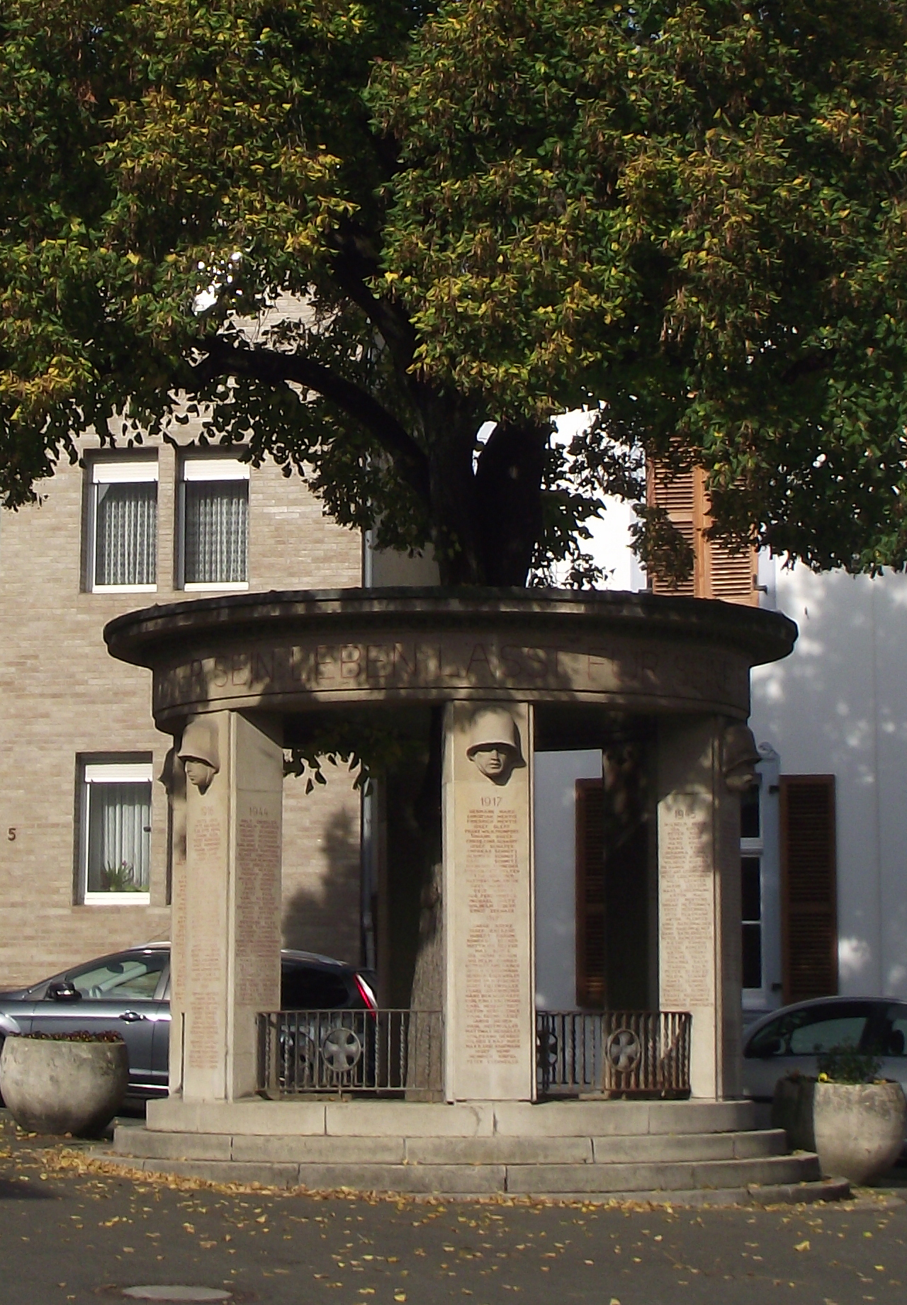 Kriegerdenkmal (Kriegerehrenmal) in Kessenich 2012